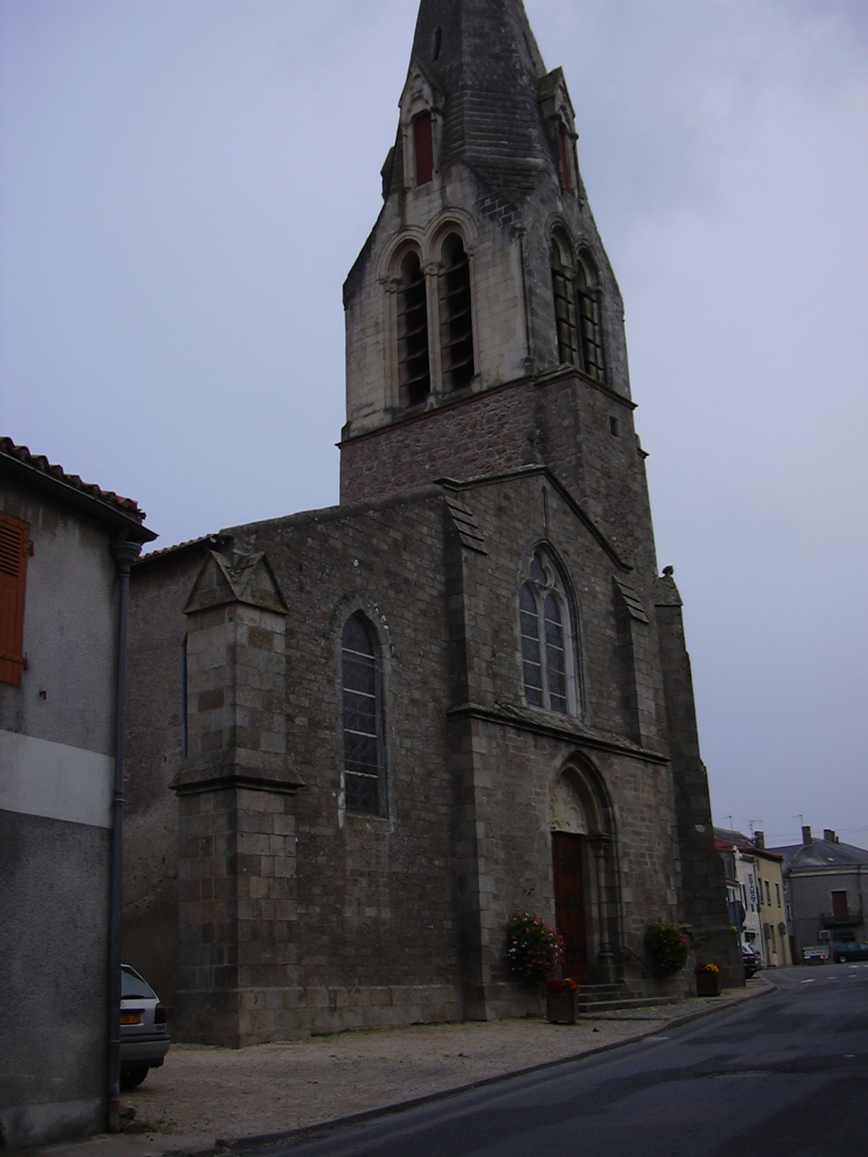 Eglise St Hilaire de Nueil les Aubiers (Deux-Sèvres - 79) monument